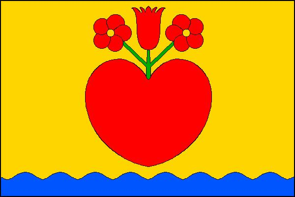 Vlajka obce Křetín